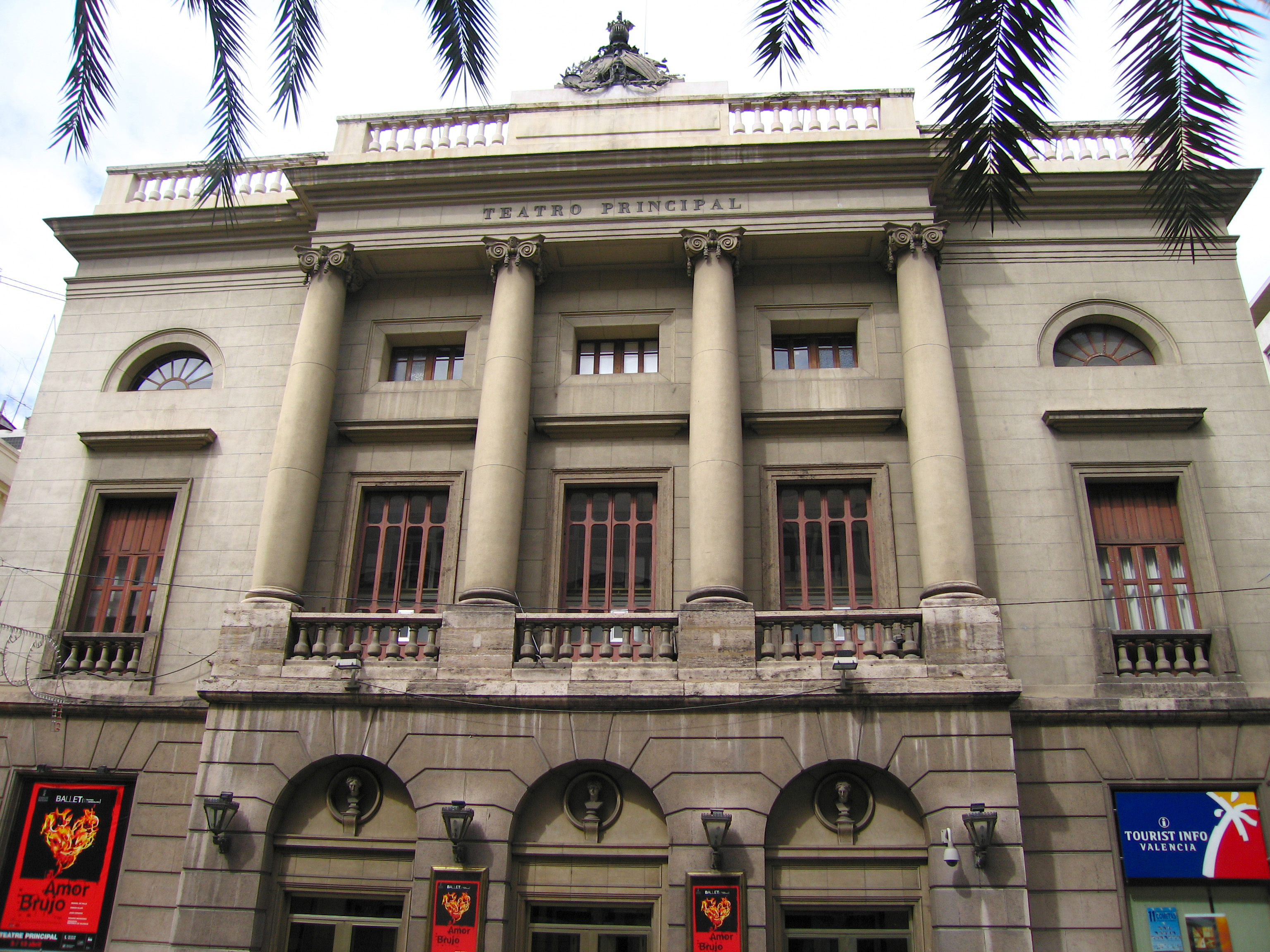 Teatre Principal València